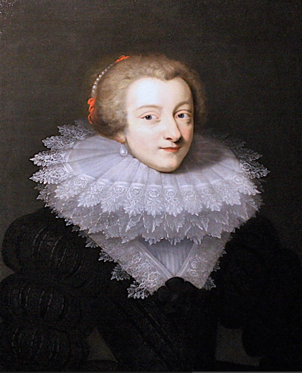 Portrait de Marie de Rohan, duchesse de Luynes, veuve de son premier époux Charles d'Albert, connétable de France.